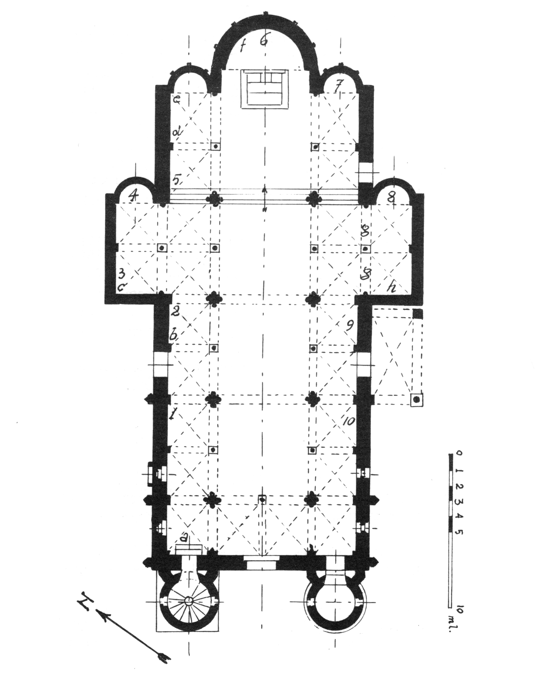 Pianta della Chiesa di San Lorenzo a Verona (Italia)